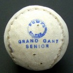 Pelote grand gant sénior